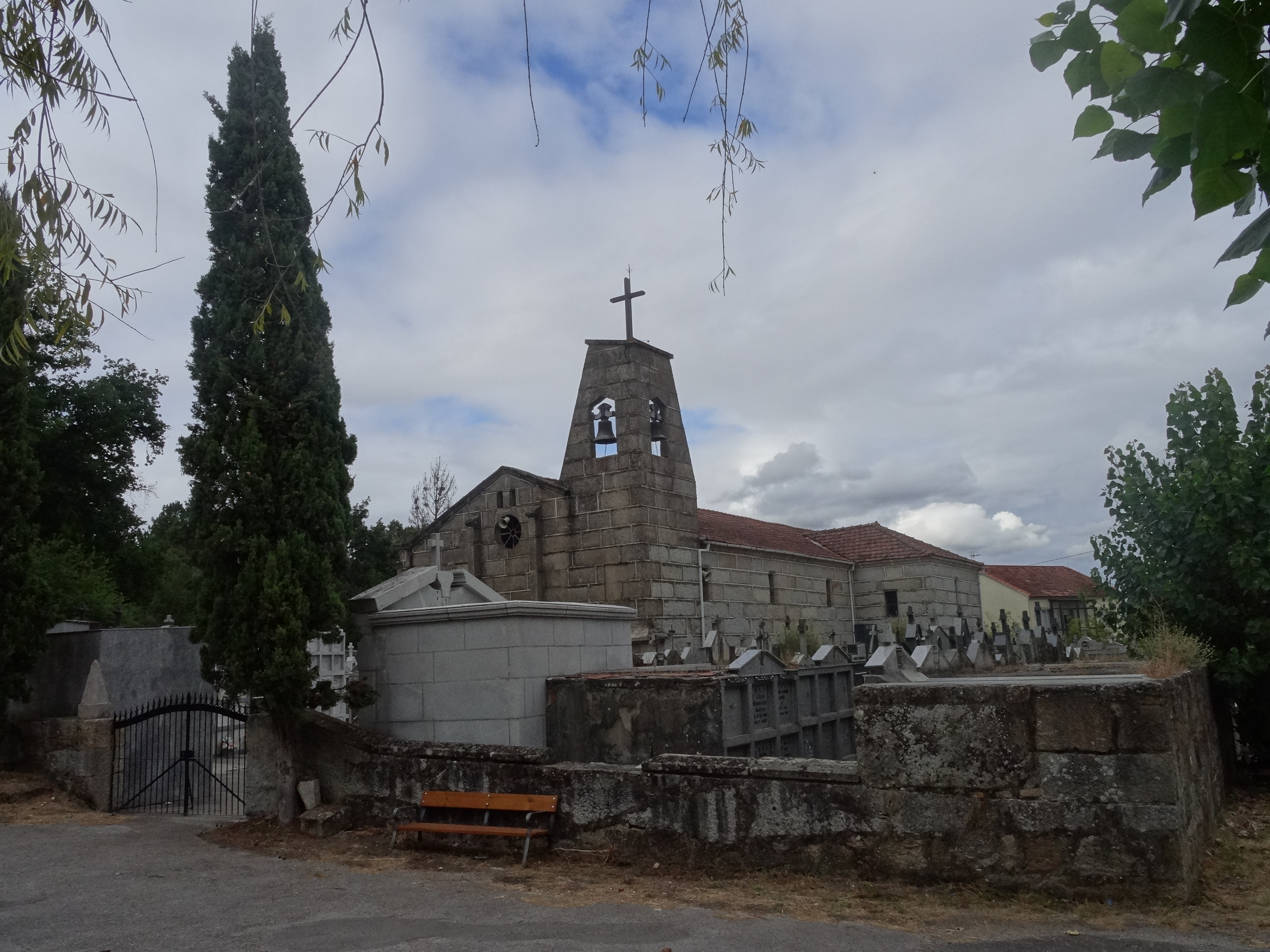 Ver título.